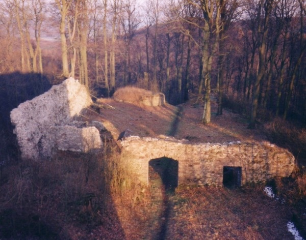 Die Ruine der Homburg in Stadtoldendorf; der Schatten links im Bild stammt vom Burgturm.